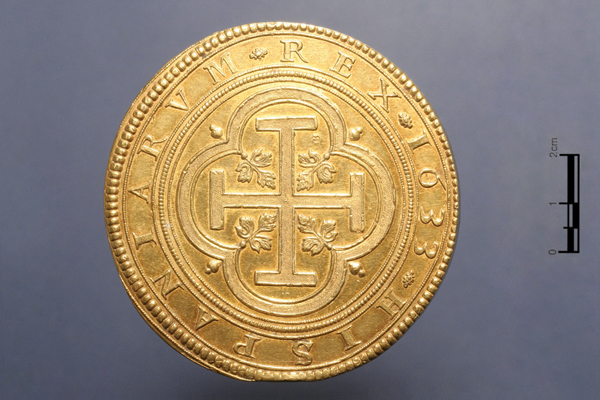 Centén segoviano de 1633 (Edad Moderna). Reverso. La leyenda, en latín, dice Hispaniarum rex (Rey de las Españas)· 1633. Número de inventario: 108085.